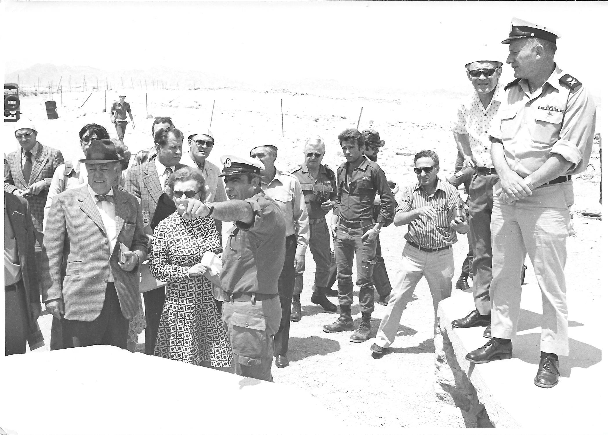 מפקד זירת ים סוף תא"ל שבתאי לוי מקבל אורחים בבסיס שלמה